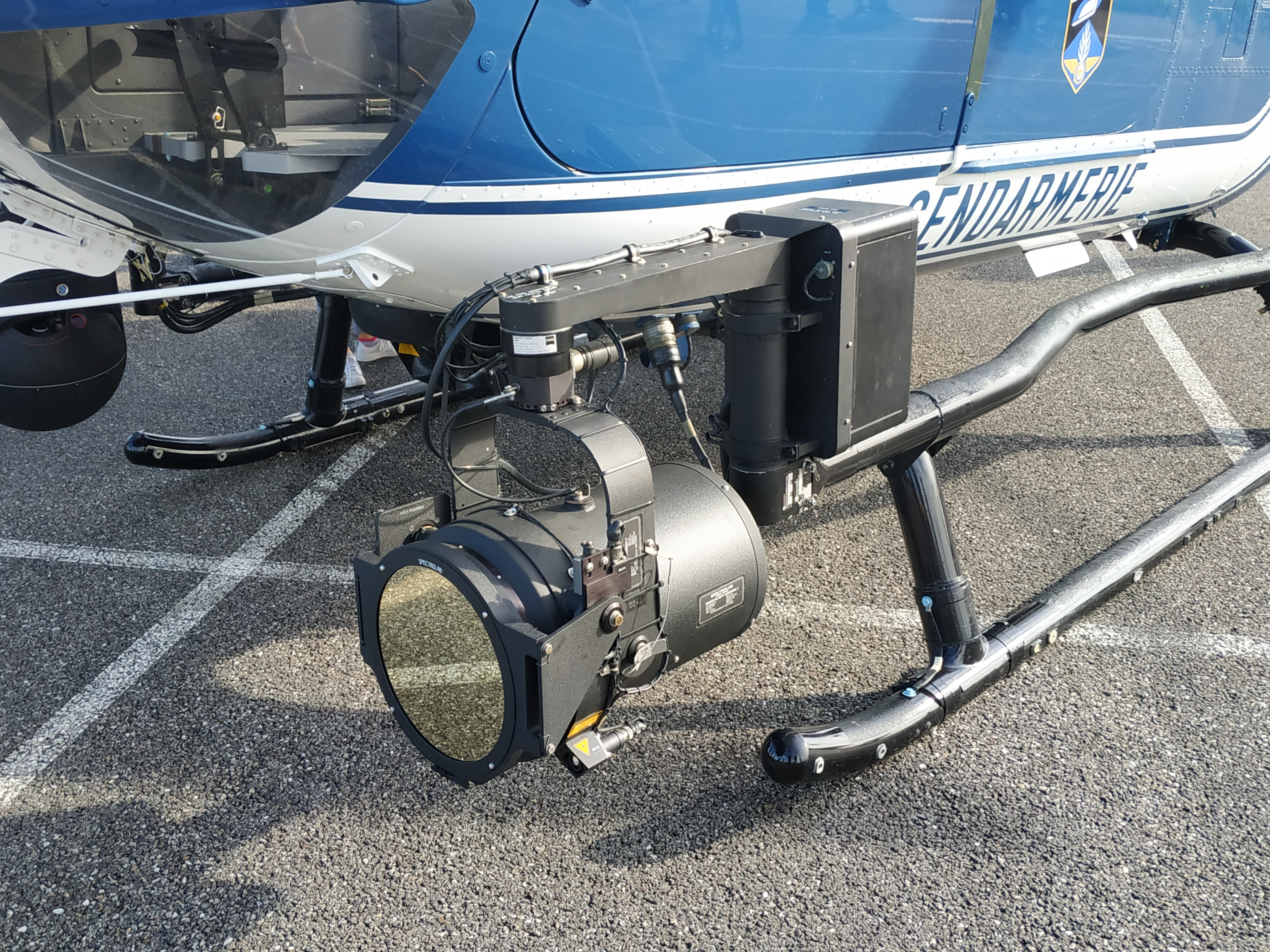 EC135 (ou H135) de la Gendarmerie nationale, immatriculé F-MJDJ, servant depuis Colmar/ Ici, vue du projecteur qui l'équipe Photo prise à Mundolsheim dans le cadre des rencontres de la sécurité intérieure de 2019